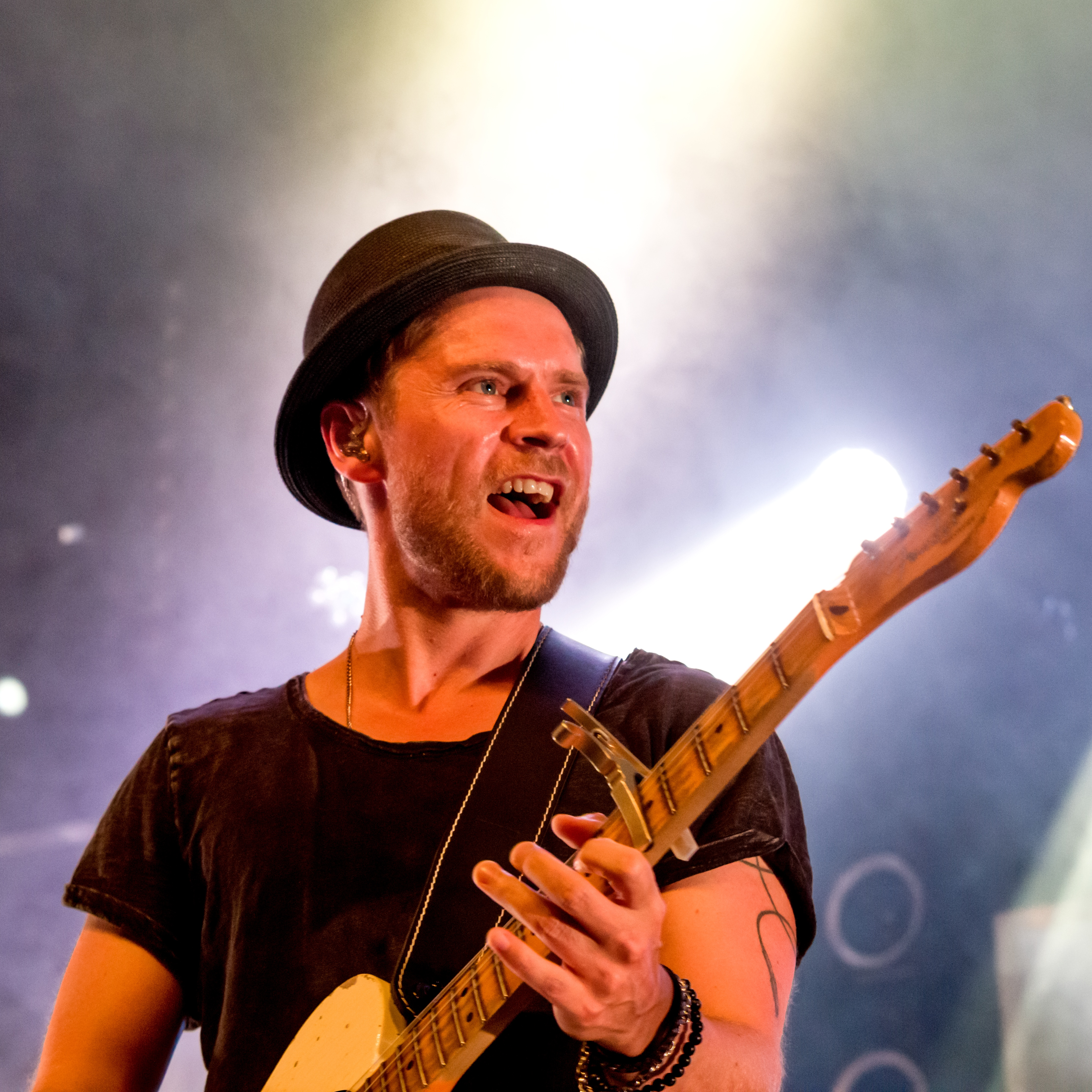 Bilder vom Zelt Musik Festival 2018 in Freiburg im Breisgau Johannes Oerding und Band am 30.07.2018